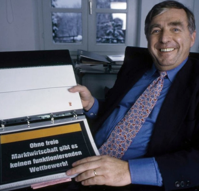 Erich Sixt, Vorstandsvorsitzender der Mietwagenkette Sixt AG am 05.12.1997 in der Unternehmenszentrale in Pullach bei München.